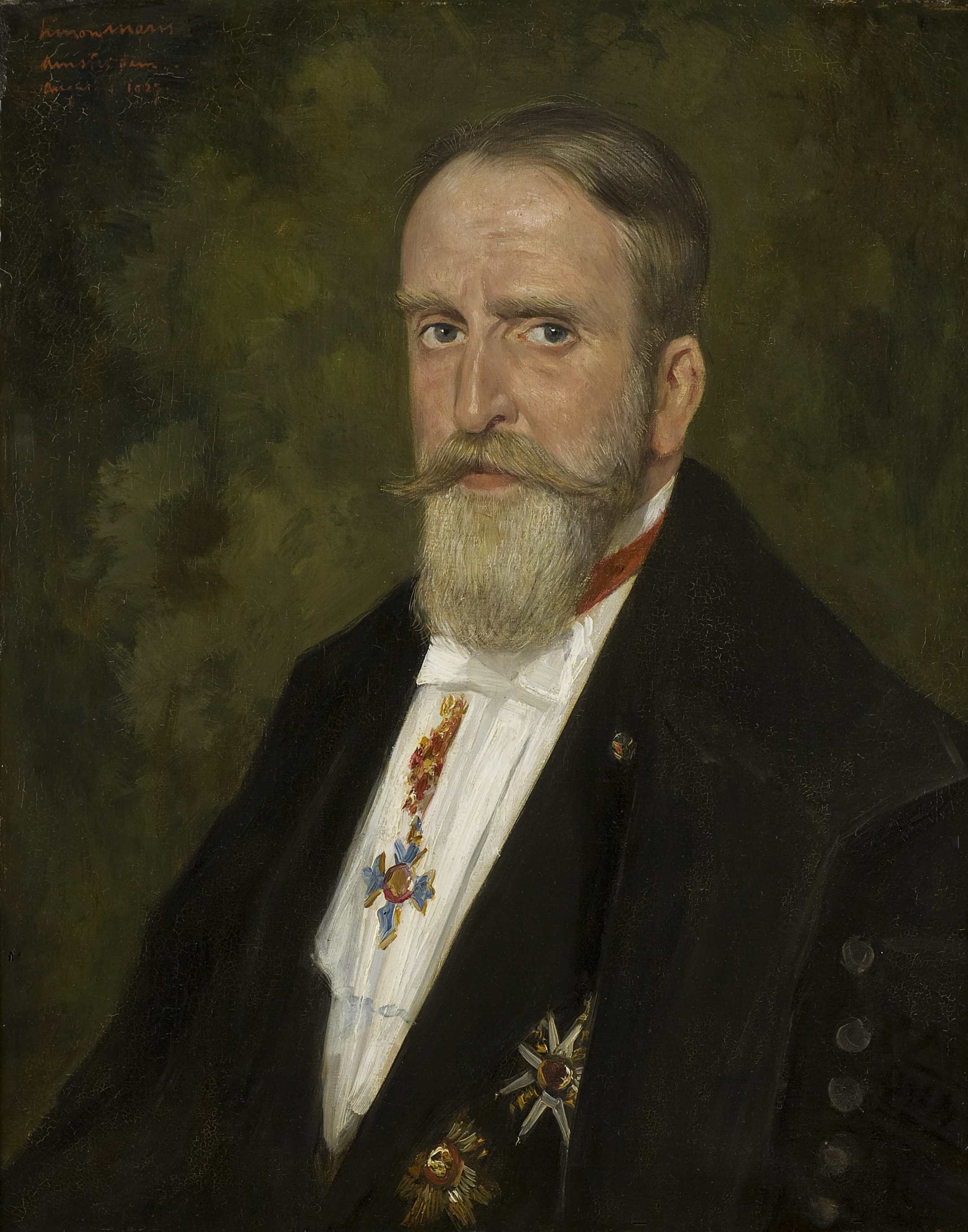 portret van Simon van der Aa borstbeeld naar links, aanziend. toga, bef, grijzend haar, baard, snor. onderscheidingsteken aan lint om hals en twee op kostuum. groen achtergrond.